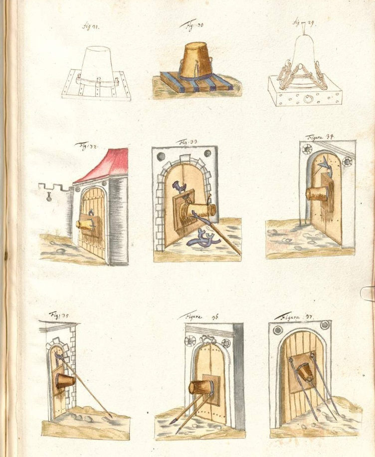 Anwendungsformen einer Petarde